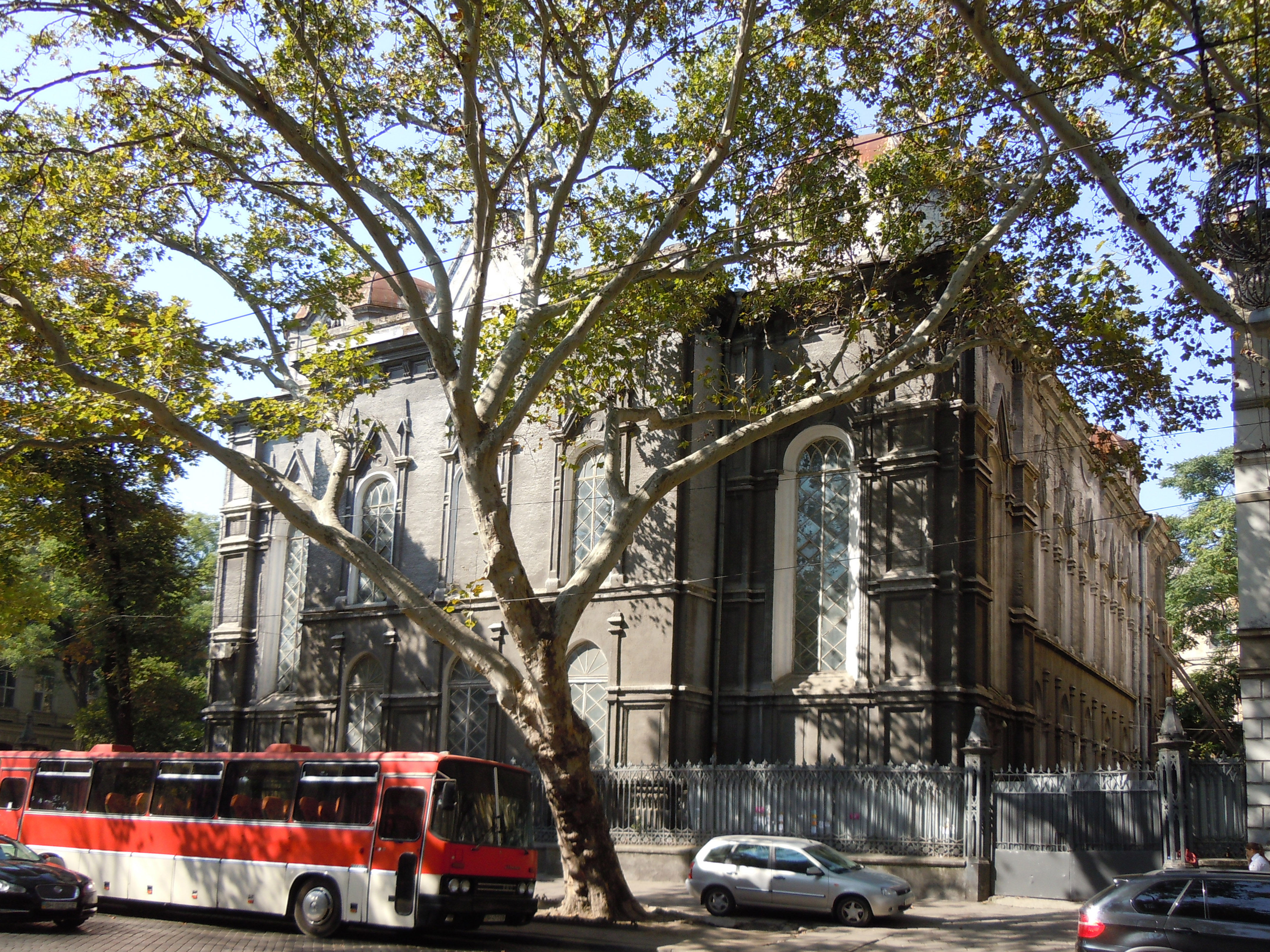 Будівля Бродської синагоги та огорожа, Одеса, Пушкінська вул., 20/18 (ріг вулиць Пушкінської, 20 та Жуковського, 18)